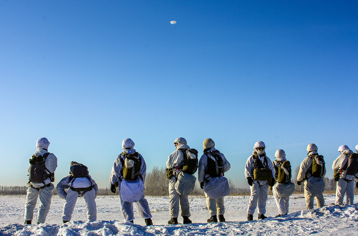 Практические прыжки с парашютом Д-10 бойцов 16-й обрспн в Тамбовской области.